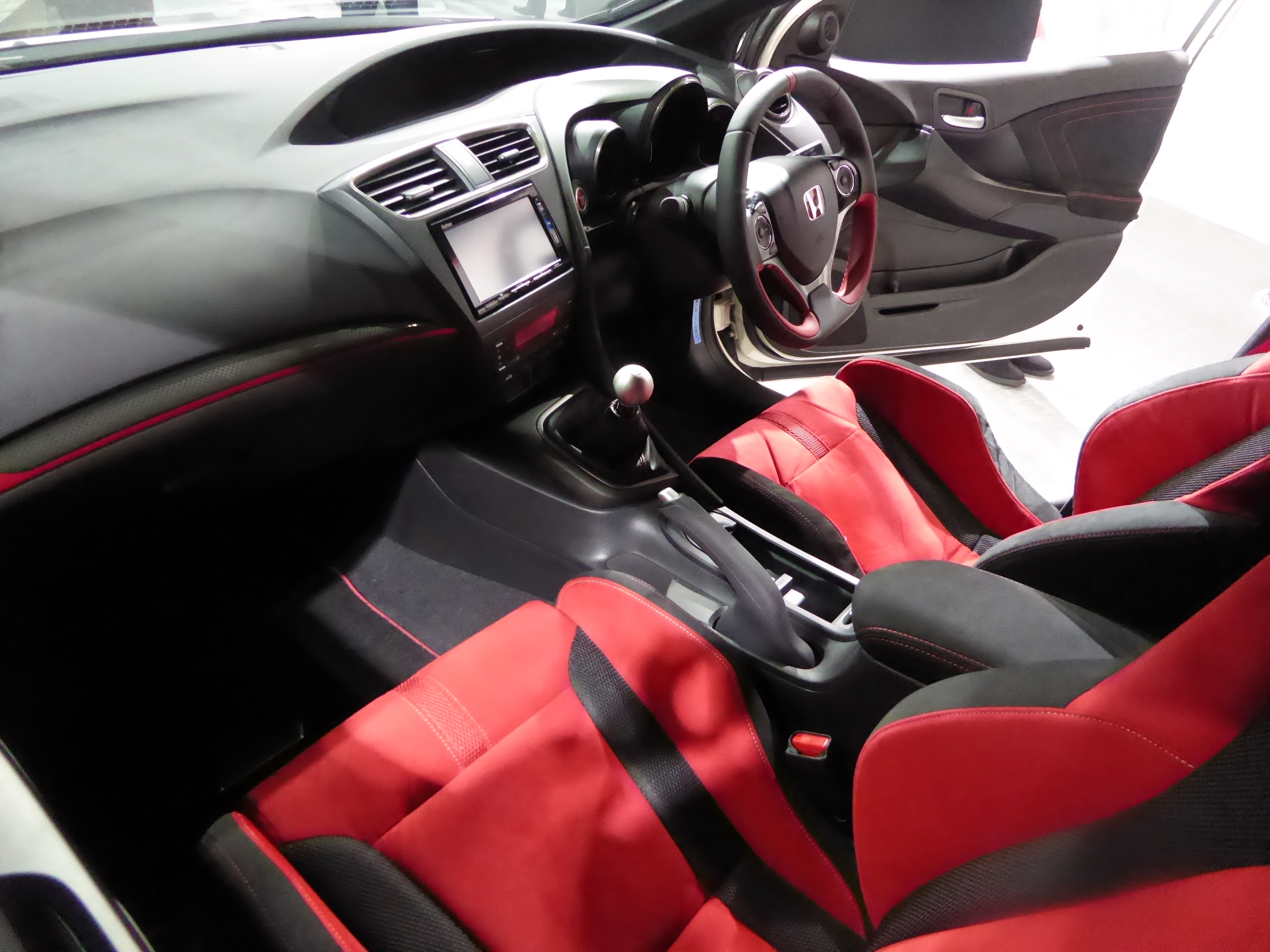 大阪モーターショー2015においてDBA-FK2型ホンダ・シビックタイプRを撮影。